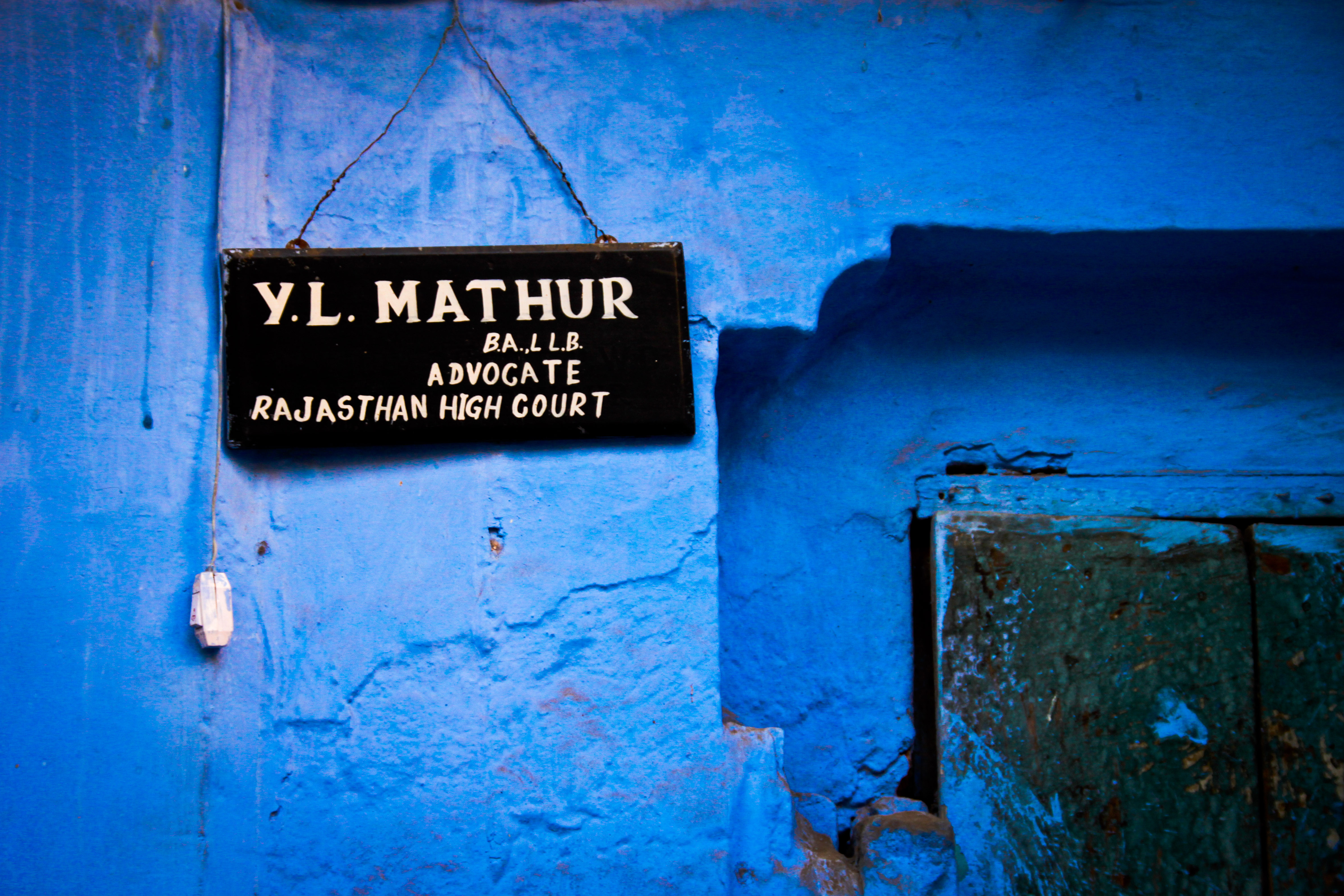 Advocate